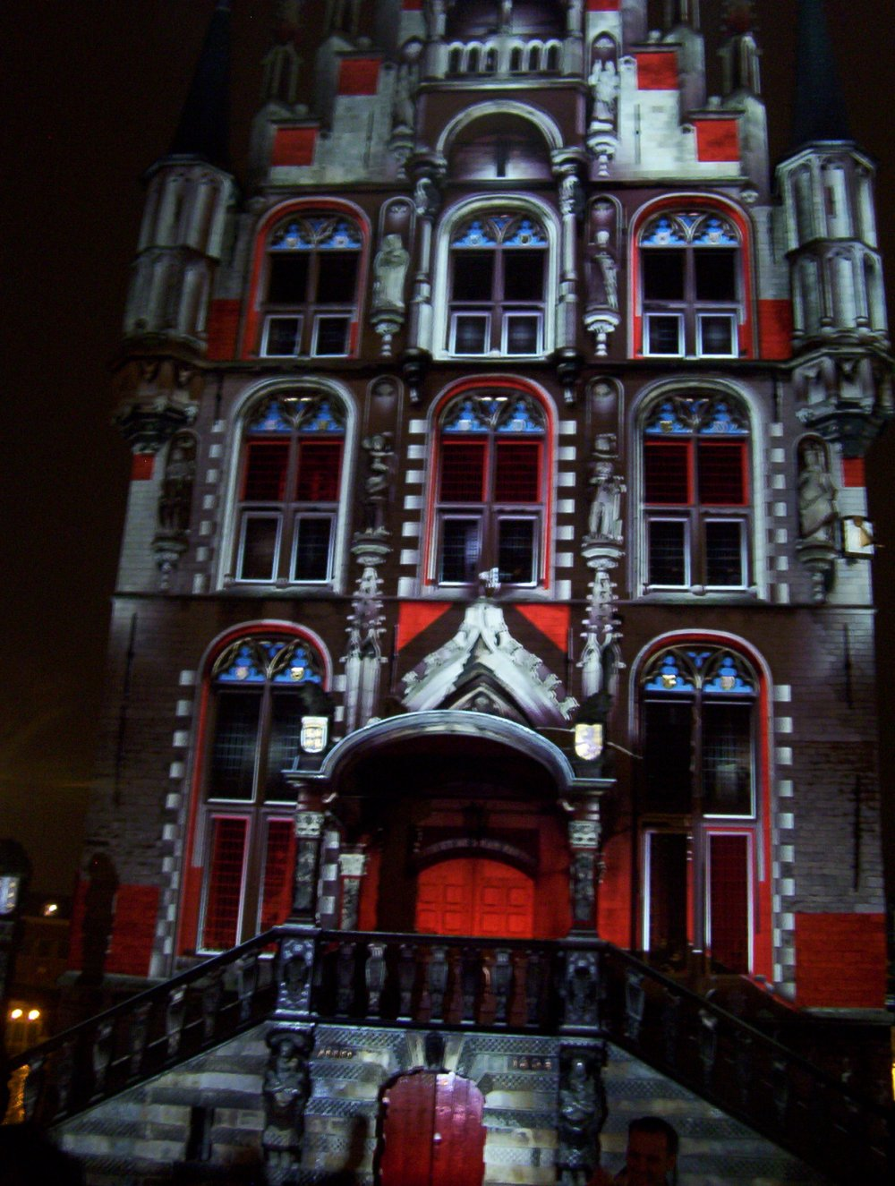 Eigen foto, beschikbaar onder GFDL